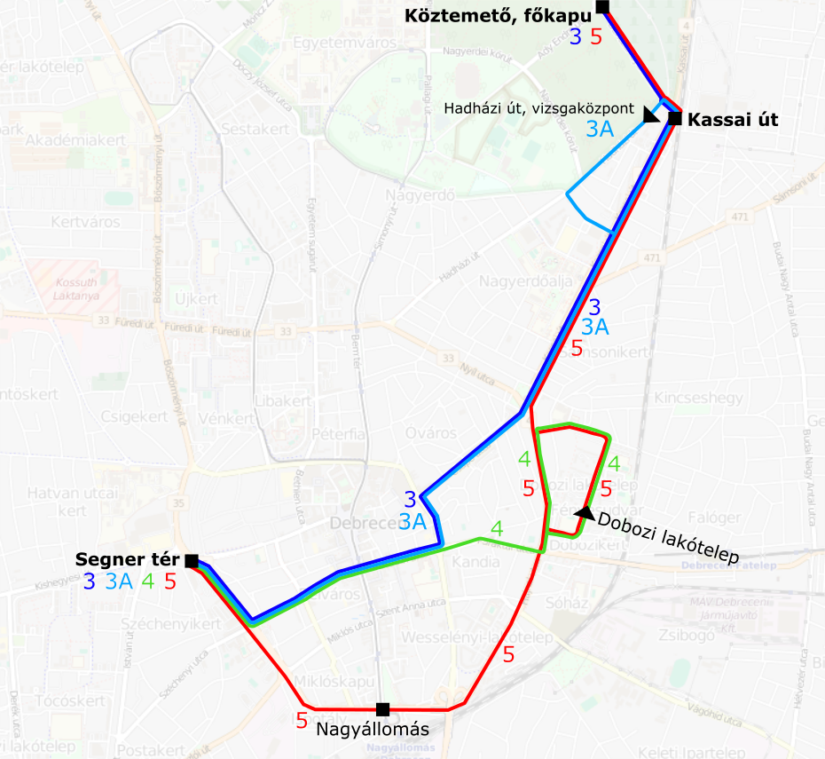 Debrecen trolihálózata 2016